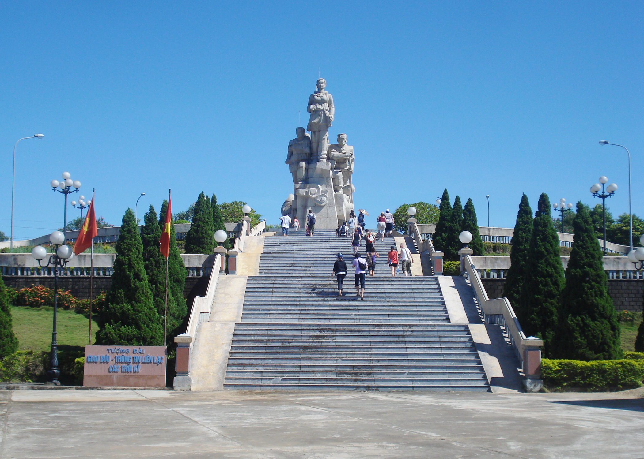 Tượng đài Giao Bưu - Thông Tin Liên Lạc Các Thời Kỳ